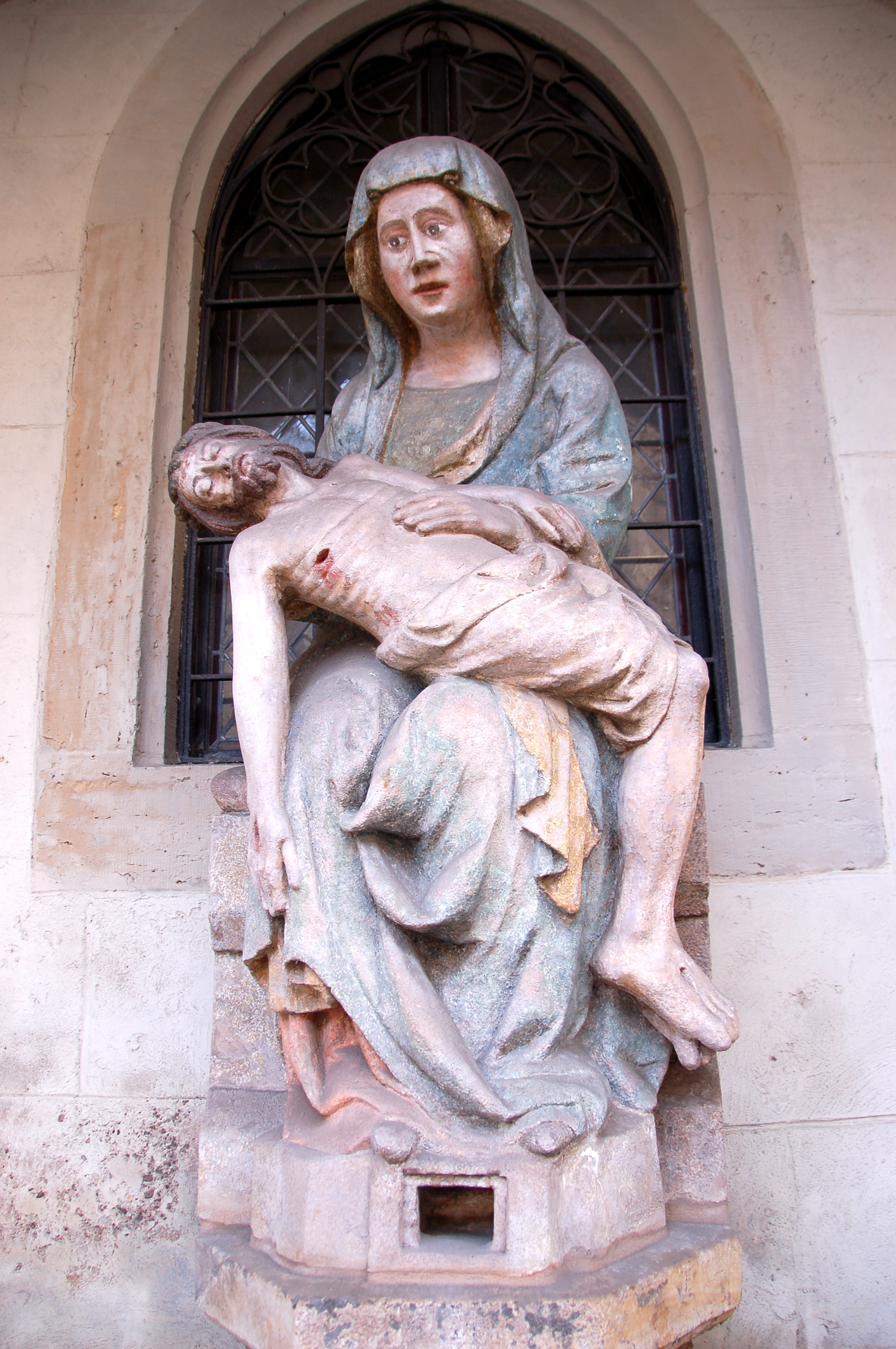 Pieta in der Fassadennische der Allerheiligenkirche in Erfurt